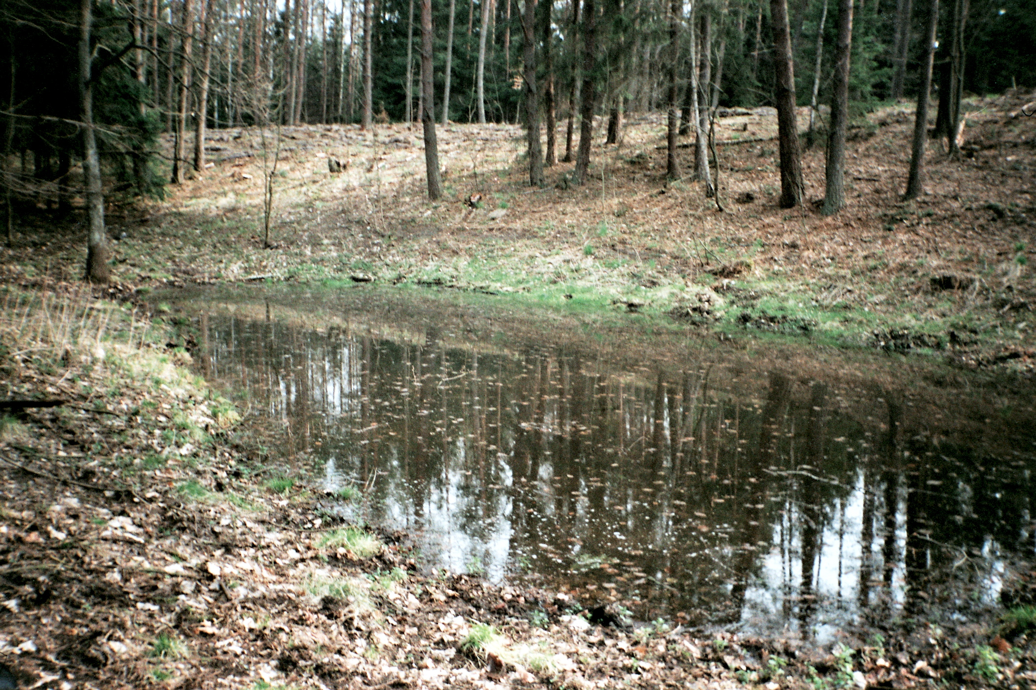 Zbiornik okresowy w Lezie Miejskim, Olsztyn, stanowisko z dziwogłowka wiosenną